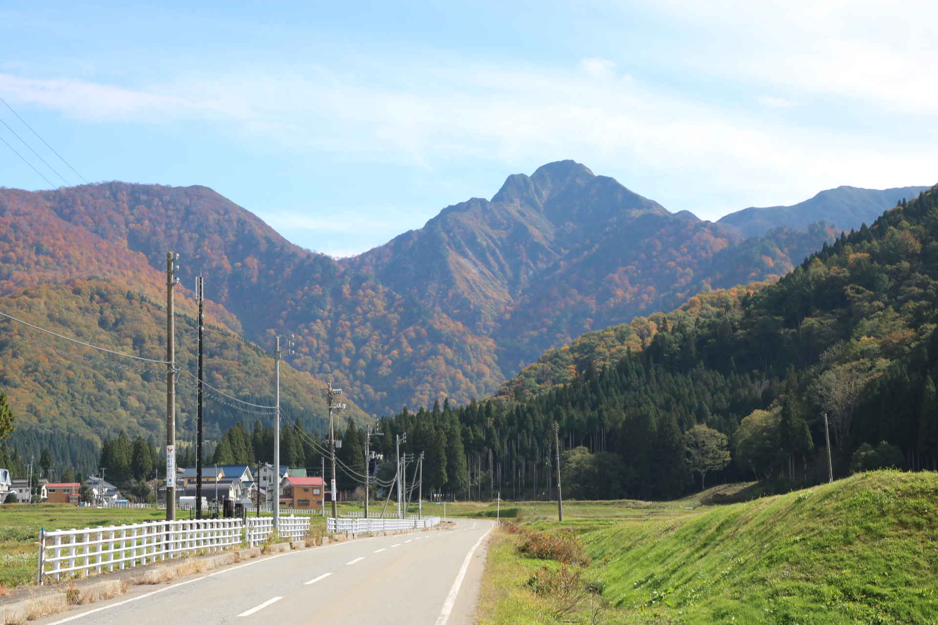 大源太山を西北西から望む。旭原から撮影。